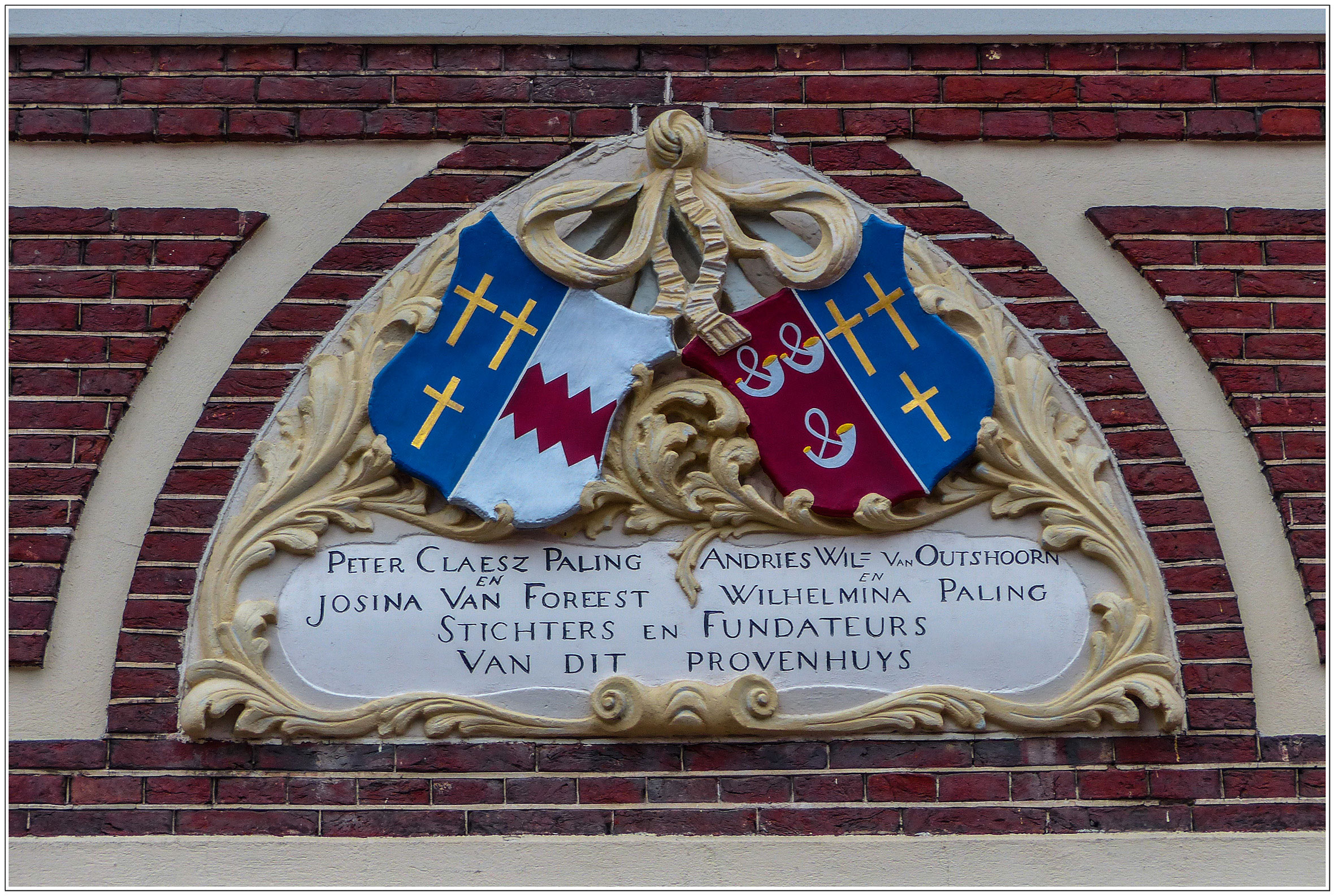 De 18de-eeuwse stichtingssteen.